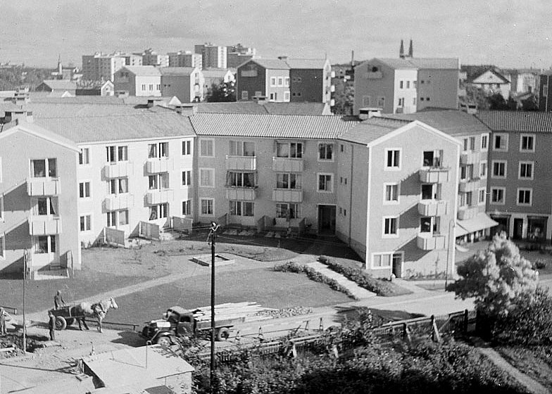 Stjärnhus i kv. Akterspegeln, Gröndal